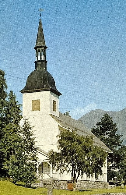 Ørsta kirke